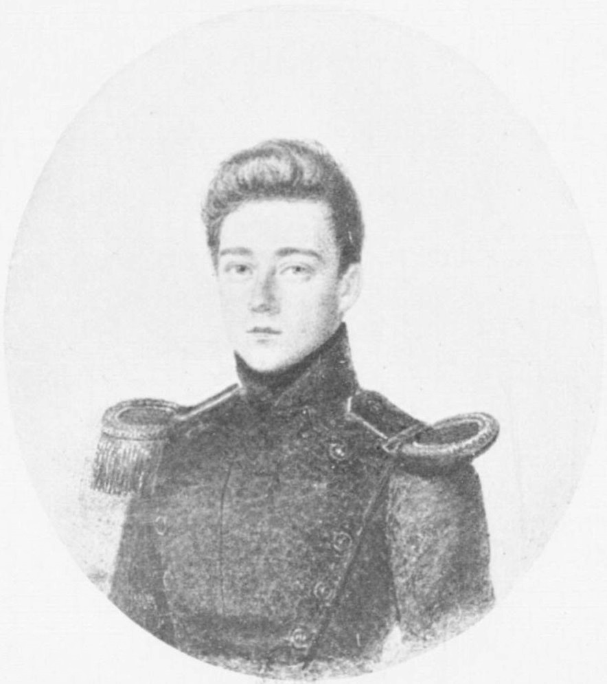 "Coffinières de Nordeck (Grégoire-Gaspard-Félix) en tenue de lieutenant au 2e régiment du Génie".